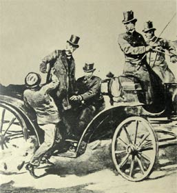 Imagem de reconstituição do atentado do anarquista Pietro Acciarito ao rei Umberto Primeiro da Itália.